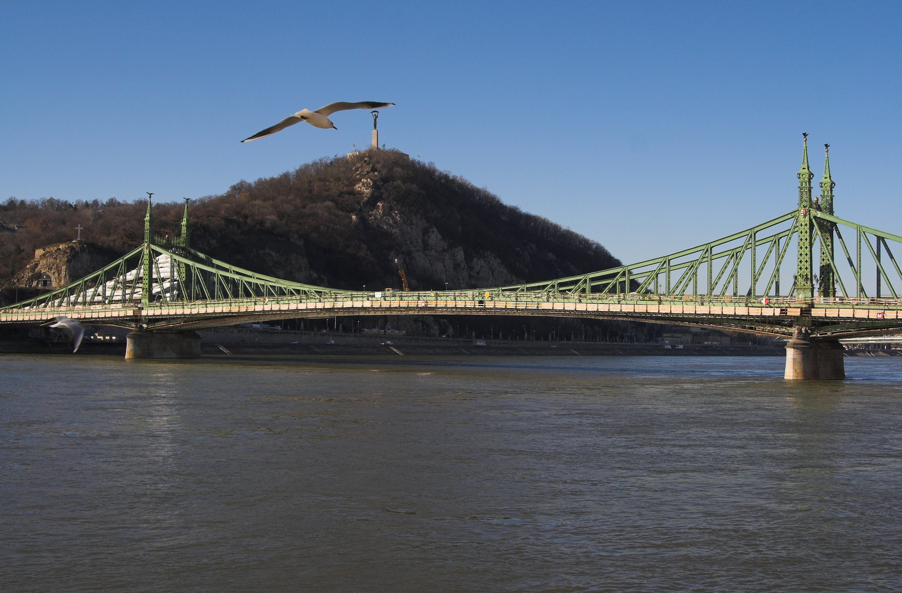 A Szabadság híd és a Gellért-hegy látképe a pesti Duna-partról a híd felújításának idején.